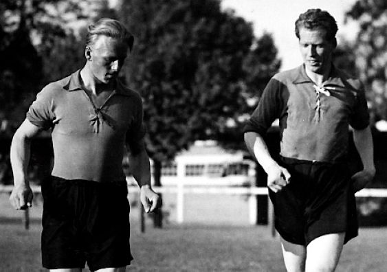 Hasse Malmström och Erik Nilsson Malmö FF, 1947.